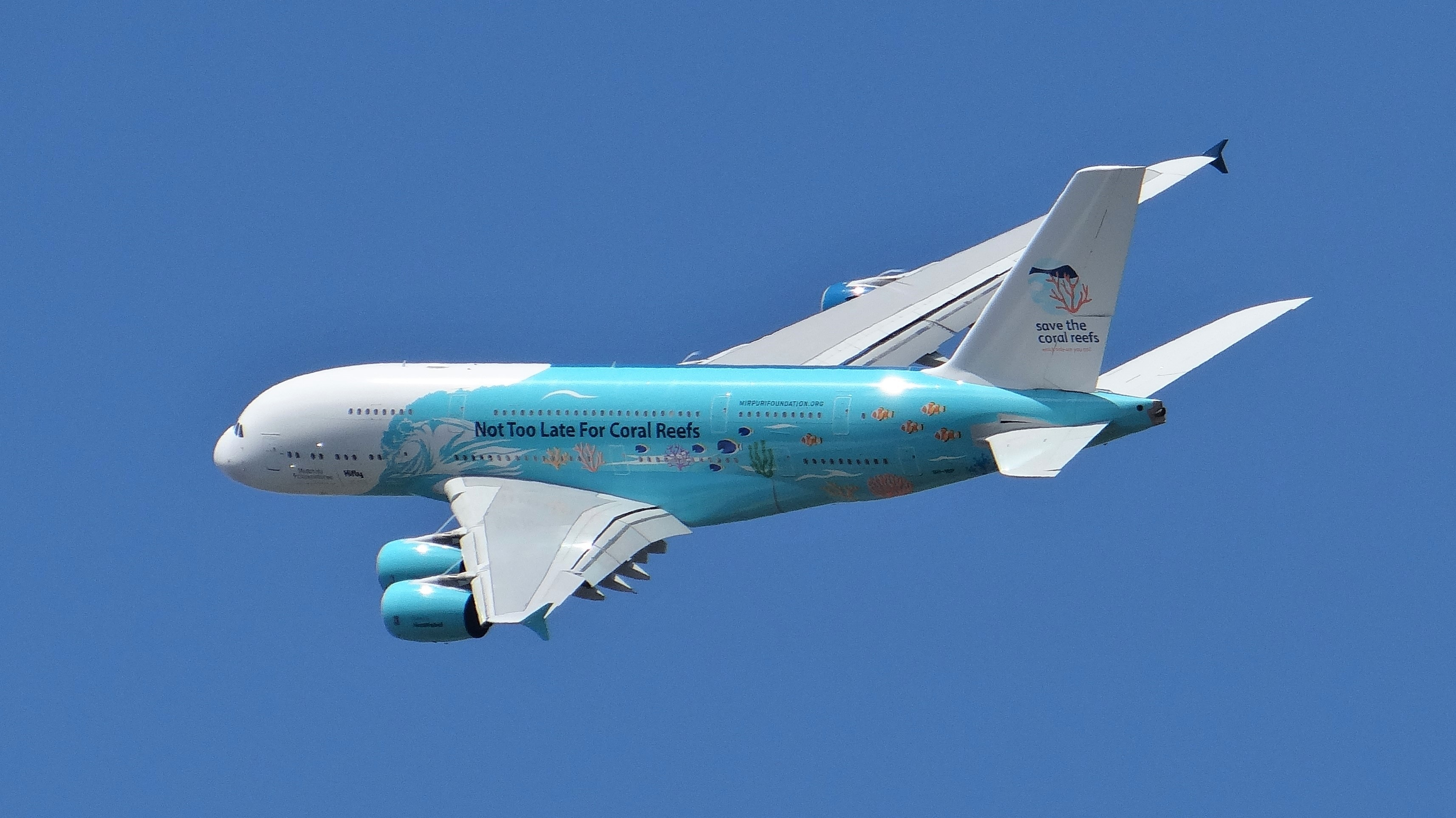 Airbus A380 9H-MIP, de la compagnie HiFly Malta en démonstration lors du Salon de Paris Le Bourget, juin 2019